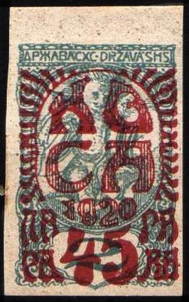 Плебисцитная марка Каринтии (Корушка). Люблинская дирекция